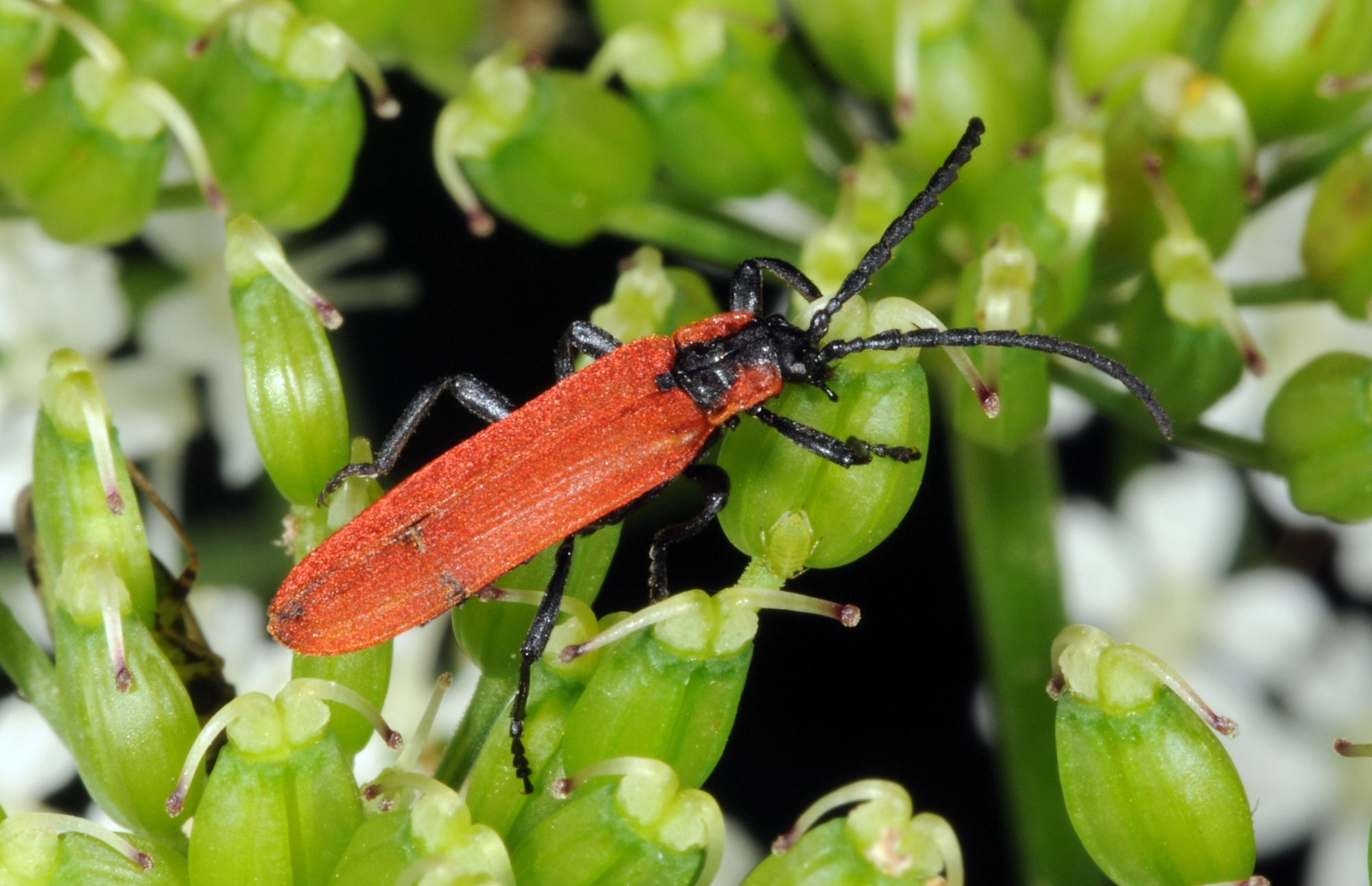 Lycidae: Lygistopterus sanguineus, 10 km östlich Pirna, Sächsische Schweiz, Sachsen, Deutschland